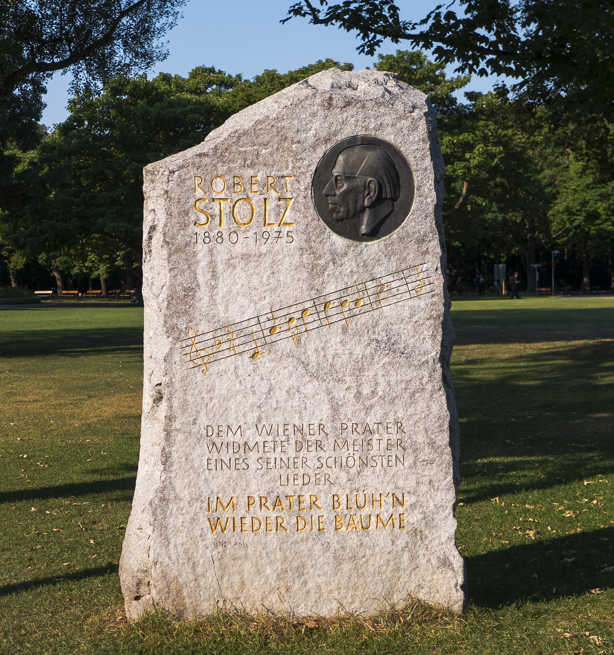 Robert-Stolz-Denkmal auf der Kaiserwiese in Wien 2